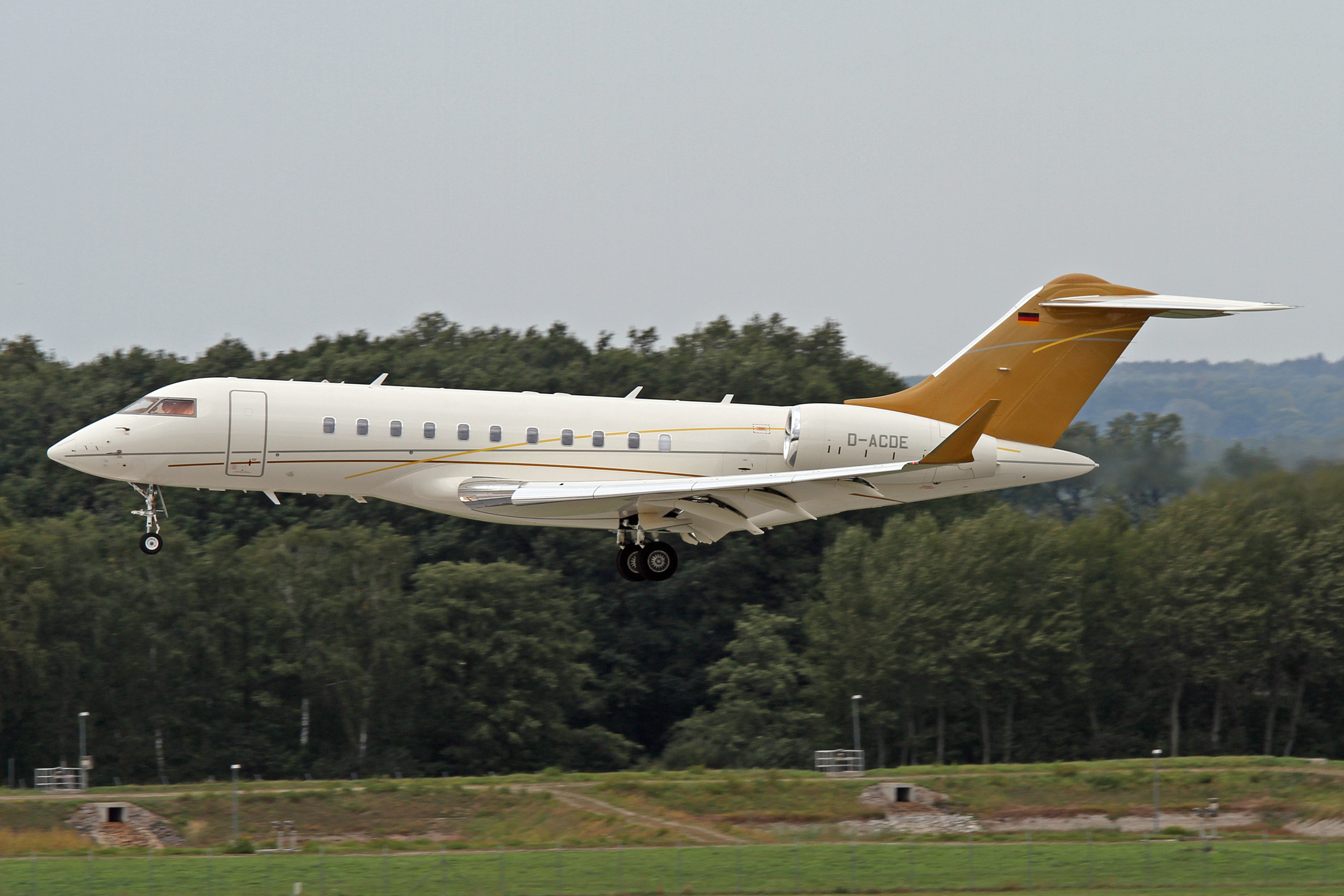 D-ACDE